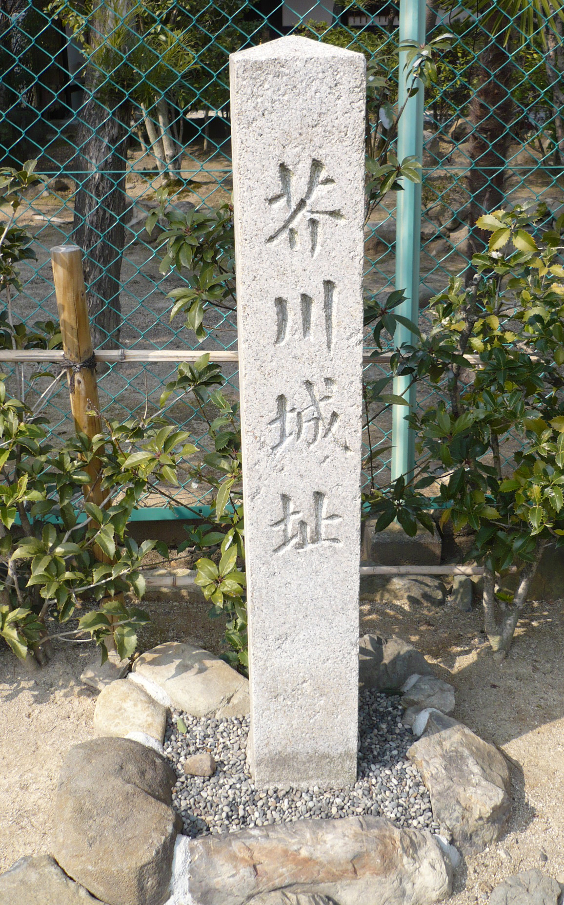 芥川城の石碑